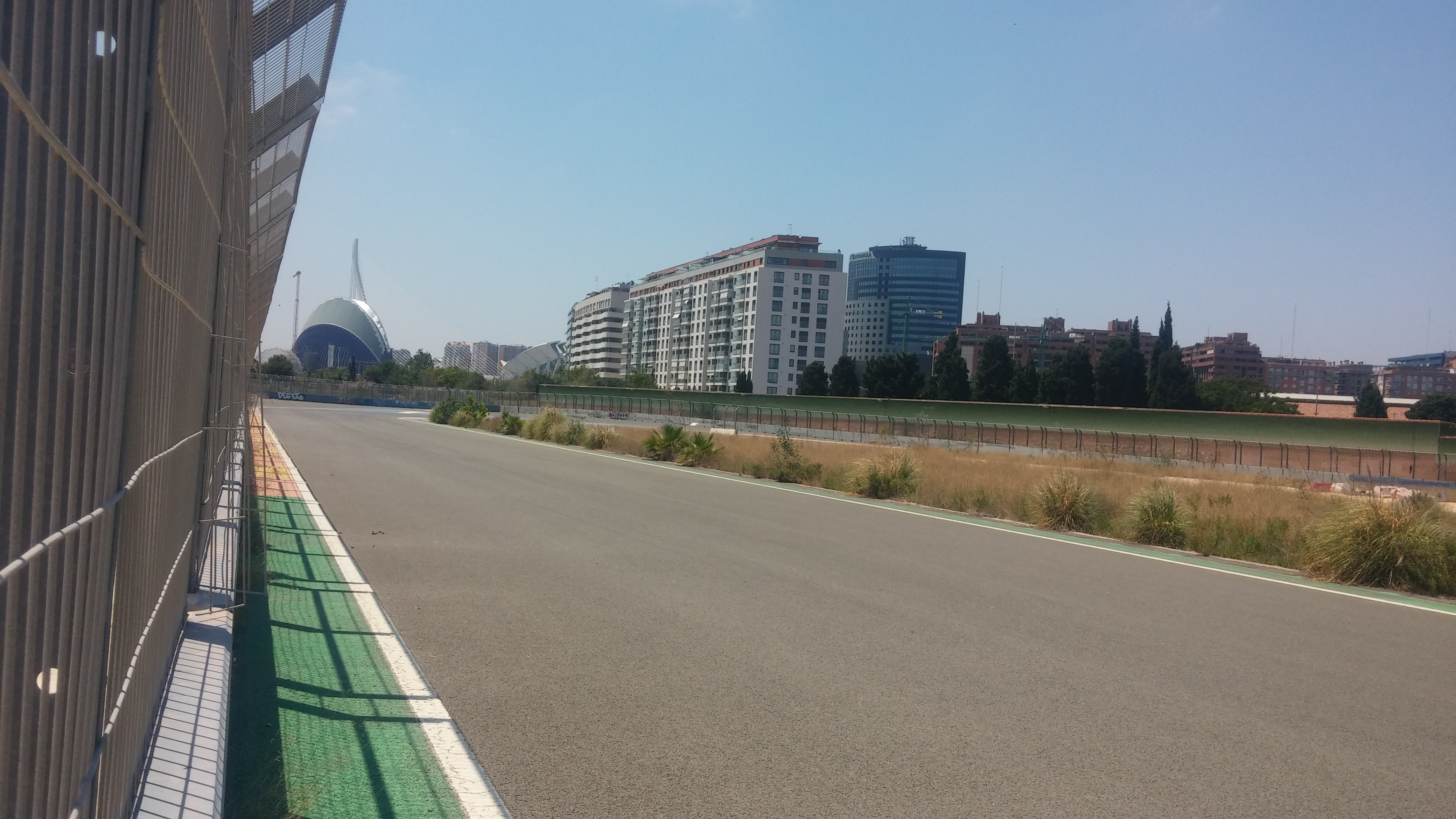 Tratto dell'abbandonato circuito urbano di Formula 1 di Valencia, in attività dal 2008 al 2012, giugno 2018